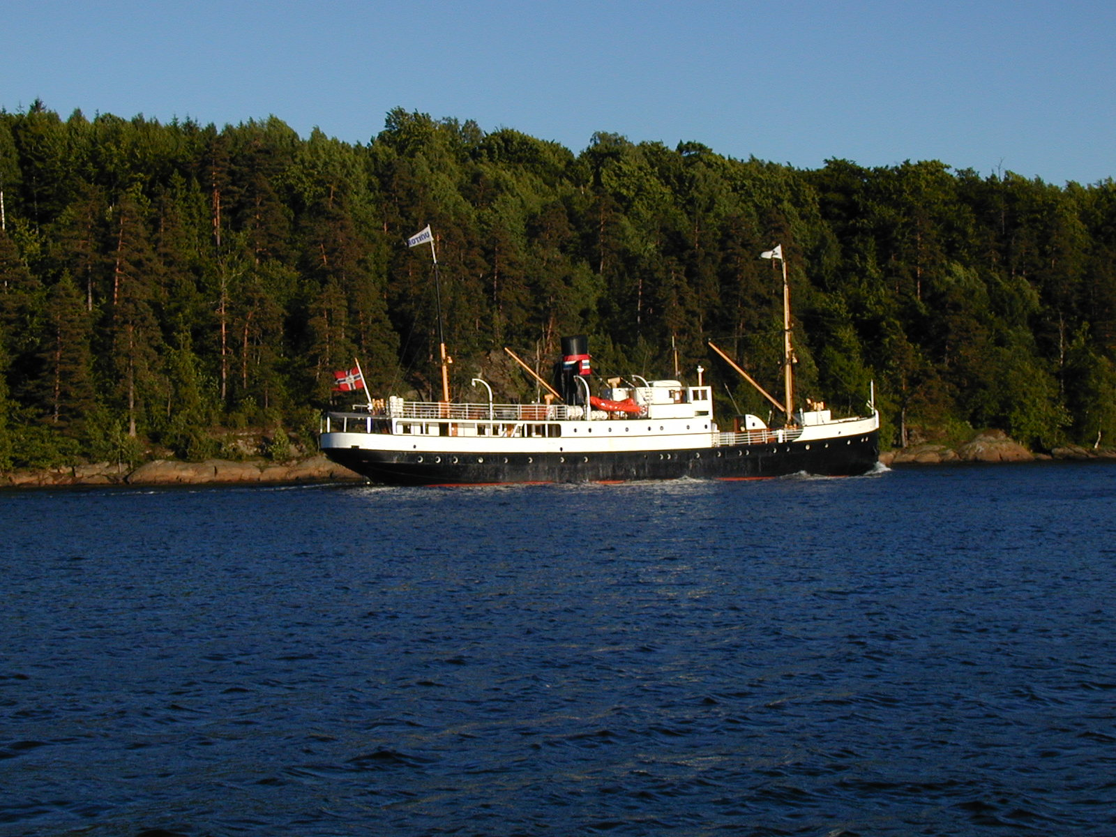 Kysten